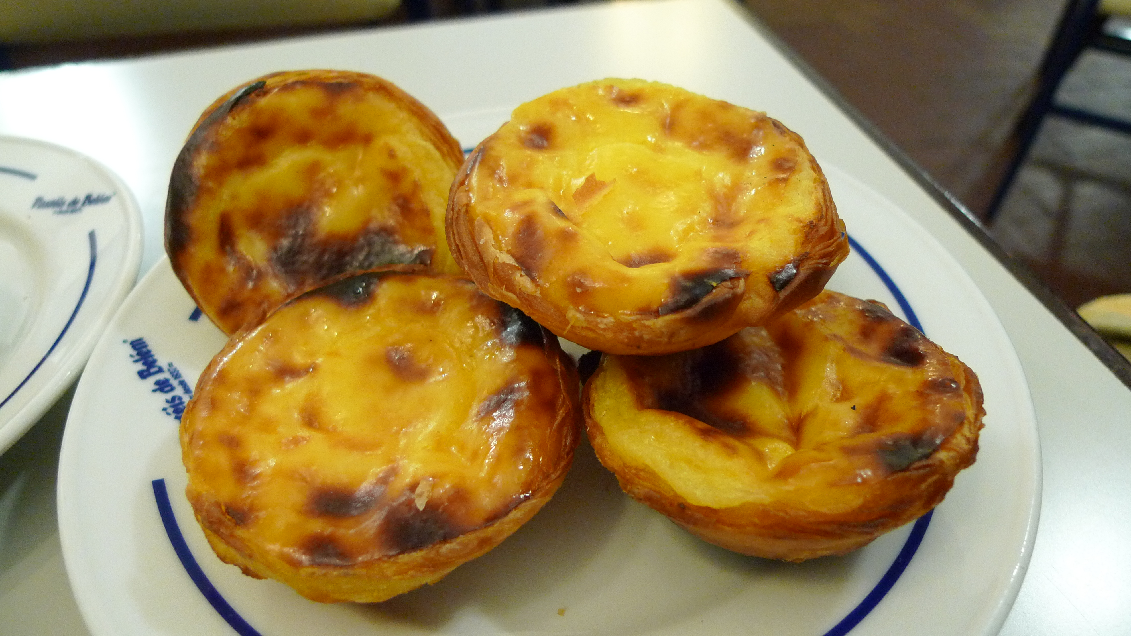 L1190316